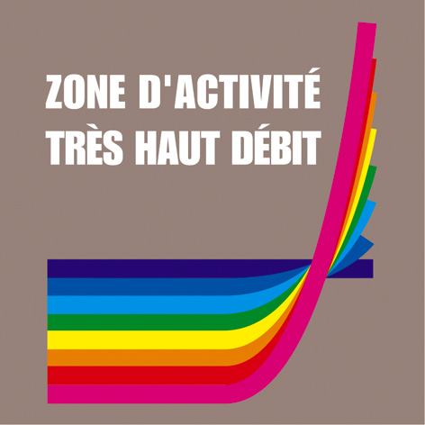 Label ZA THD